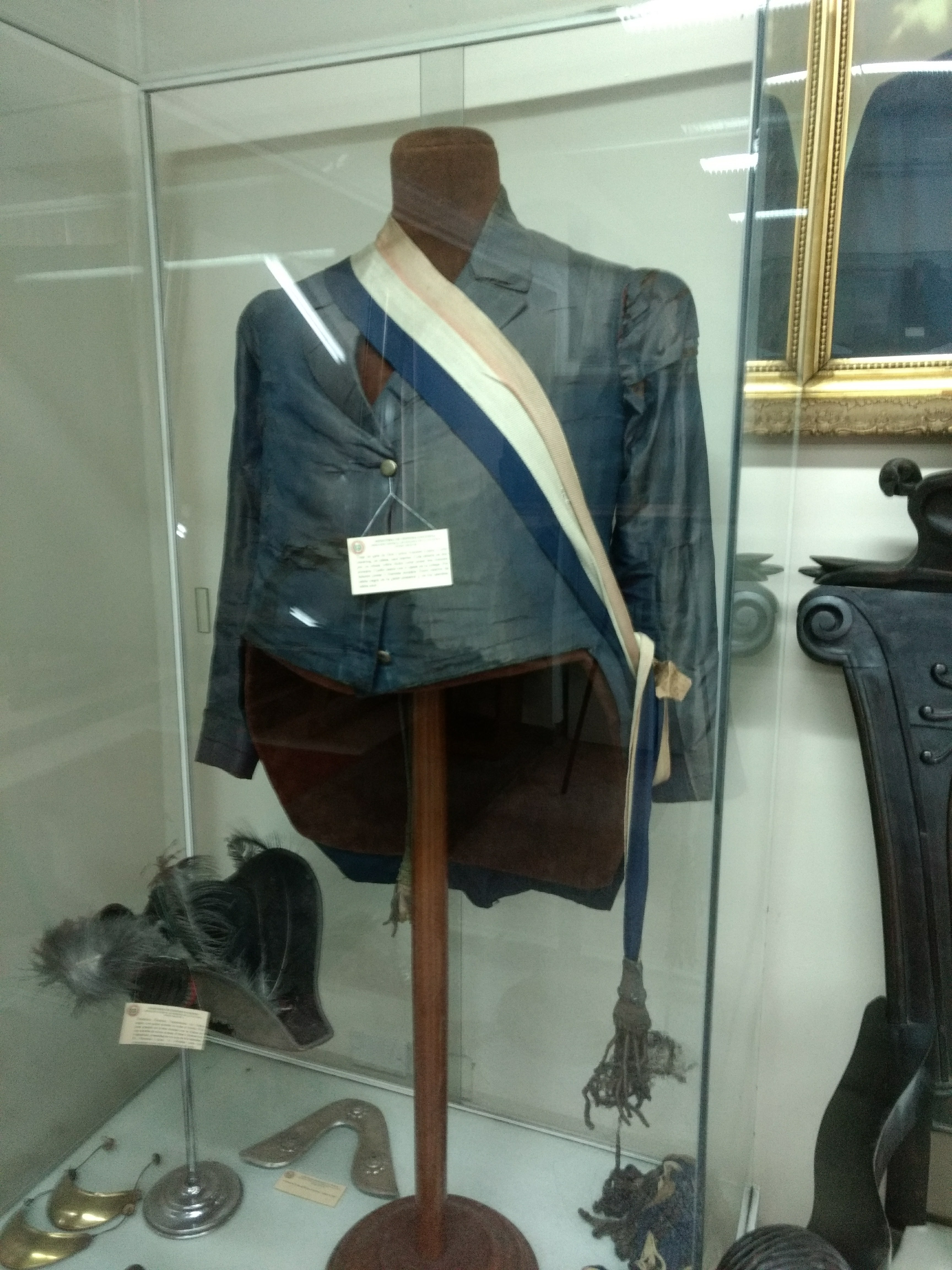 Uniforme de Capitán General perteneciente y utilizado por el primer presidente constitucional paraguayo Carlos Antonio López (Museo Militar del Paraguay)